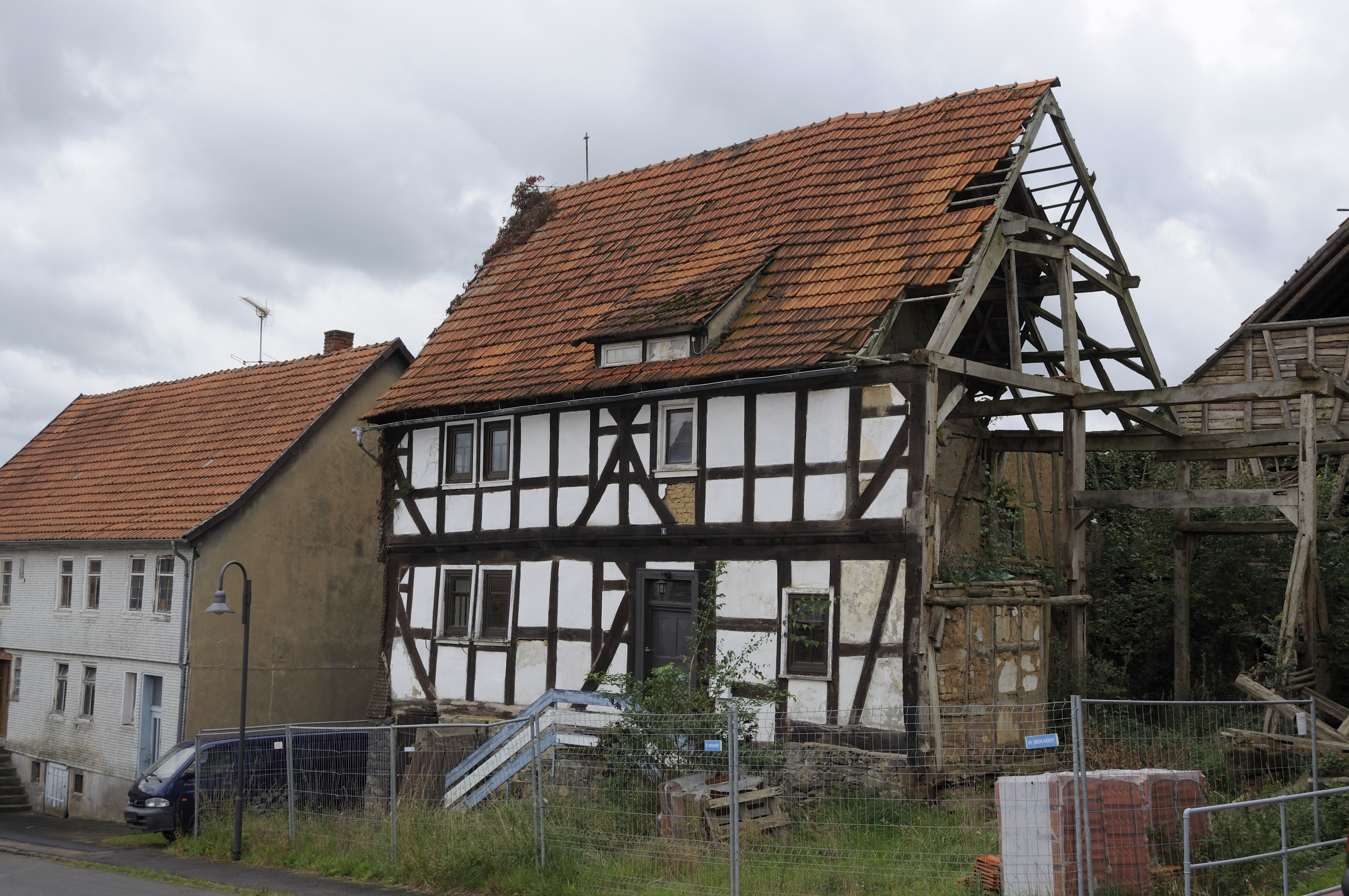 Dieses Foto entstand im Rahmen des Projekts Wiki Loves Monuments Mittelhessen, das aus dem Community-Projektbudget von Wikimedia Deutschland e. V. gefördert wurde.